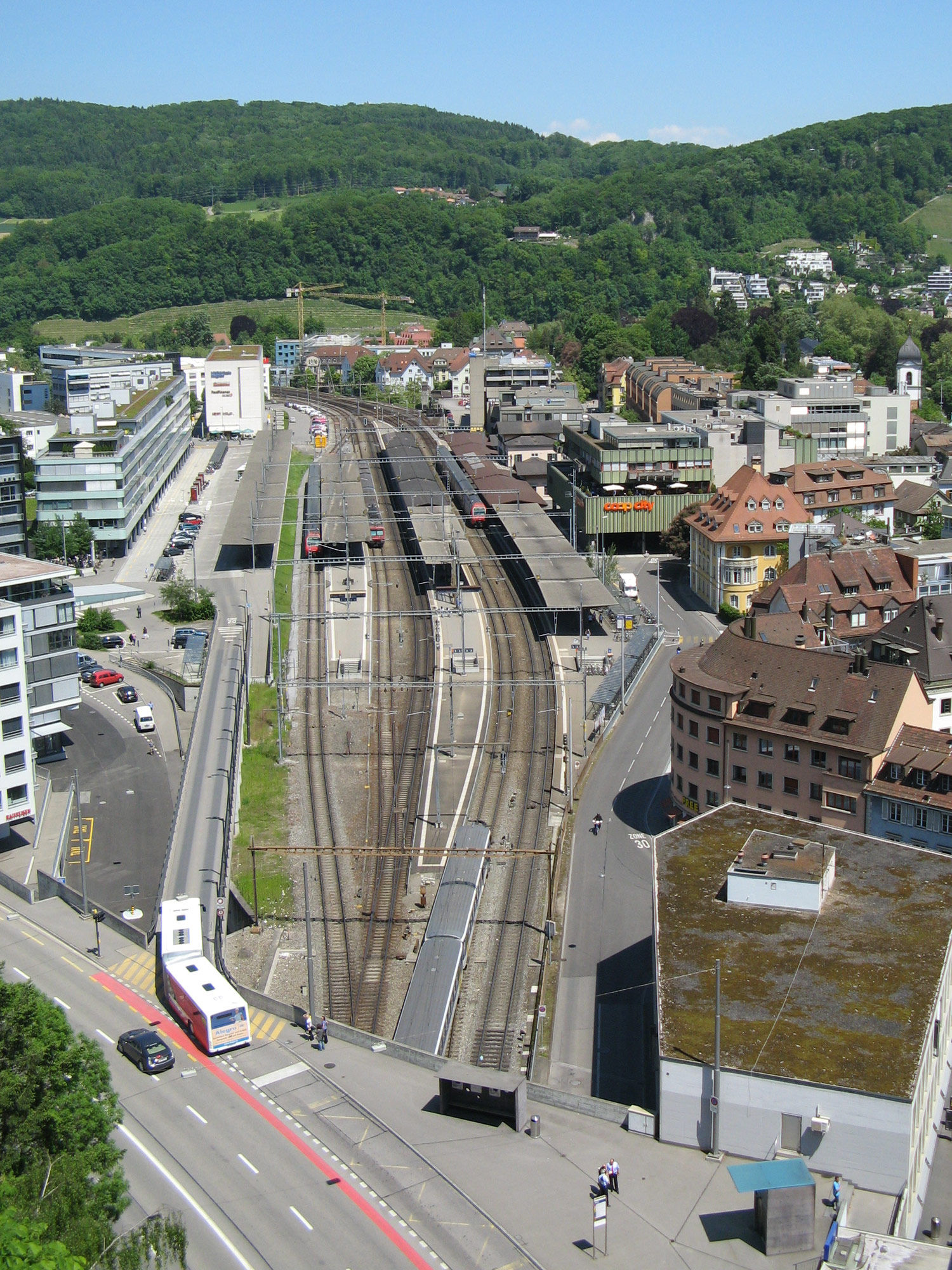 Ansicht des Bahnhofs Baden, von der Ruine Stein aus gesehen